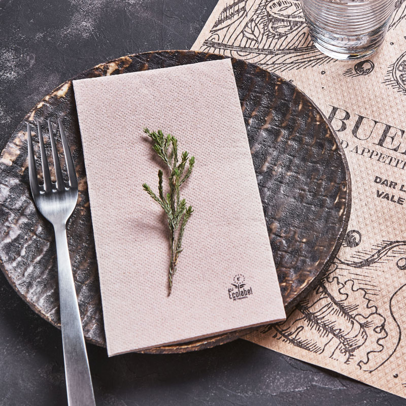 Servilleta de papel reciclada